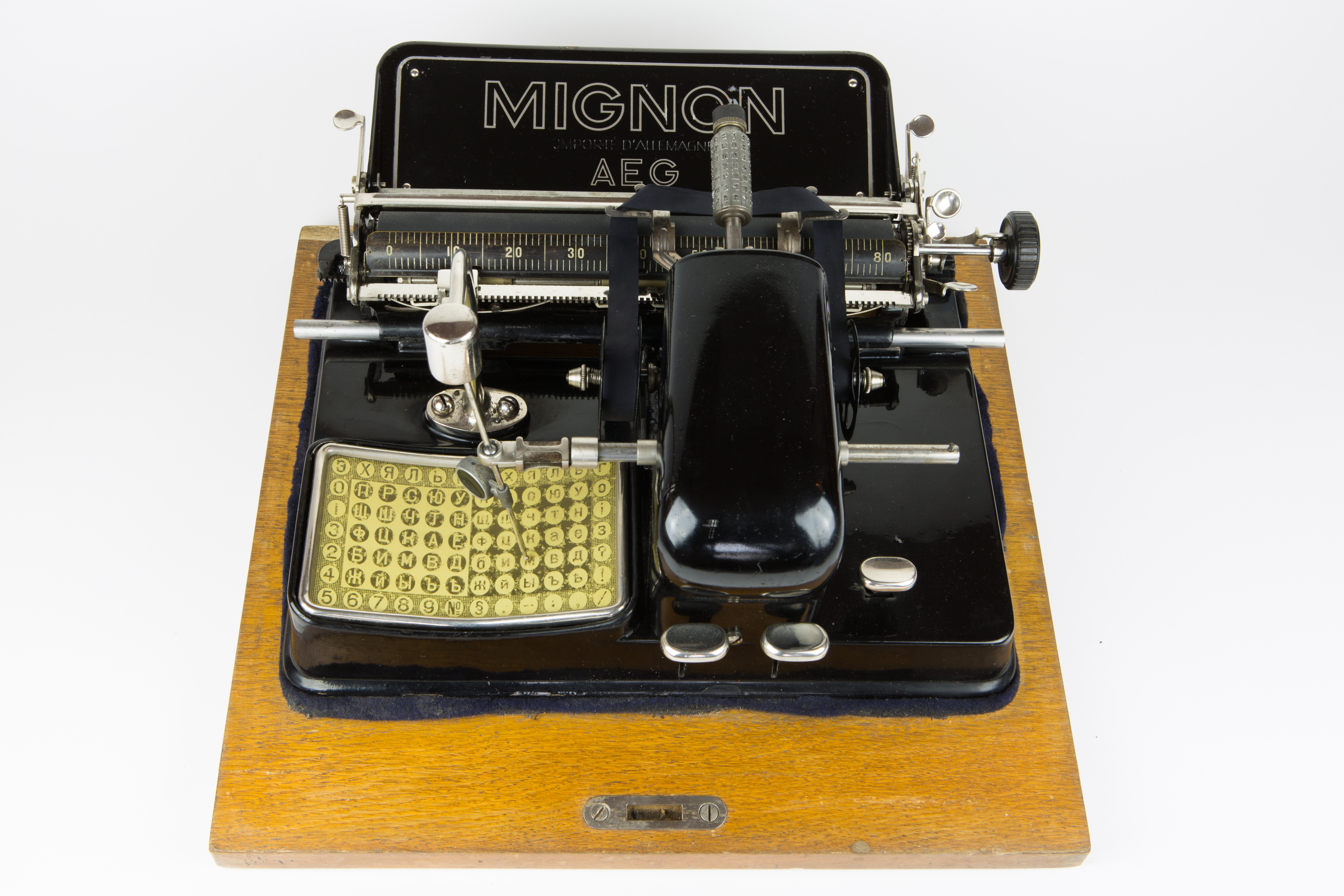 Machine à écrire Mignon - Modèle 4 - fabriquée en 1930